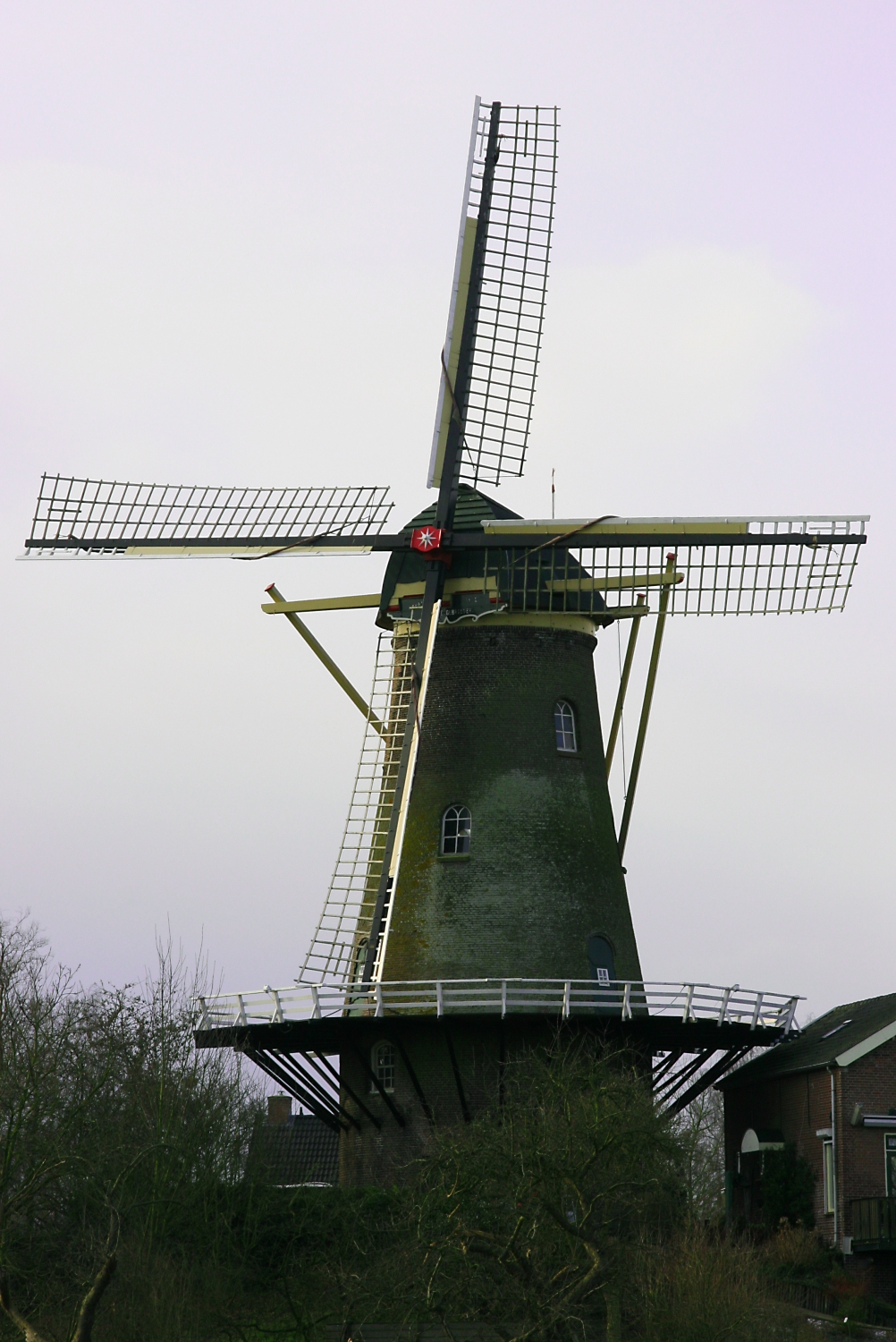 Wijk en Aalburg- Molen De twee Gebroeders